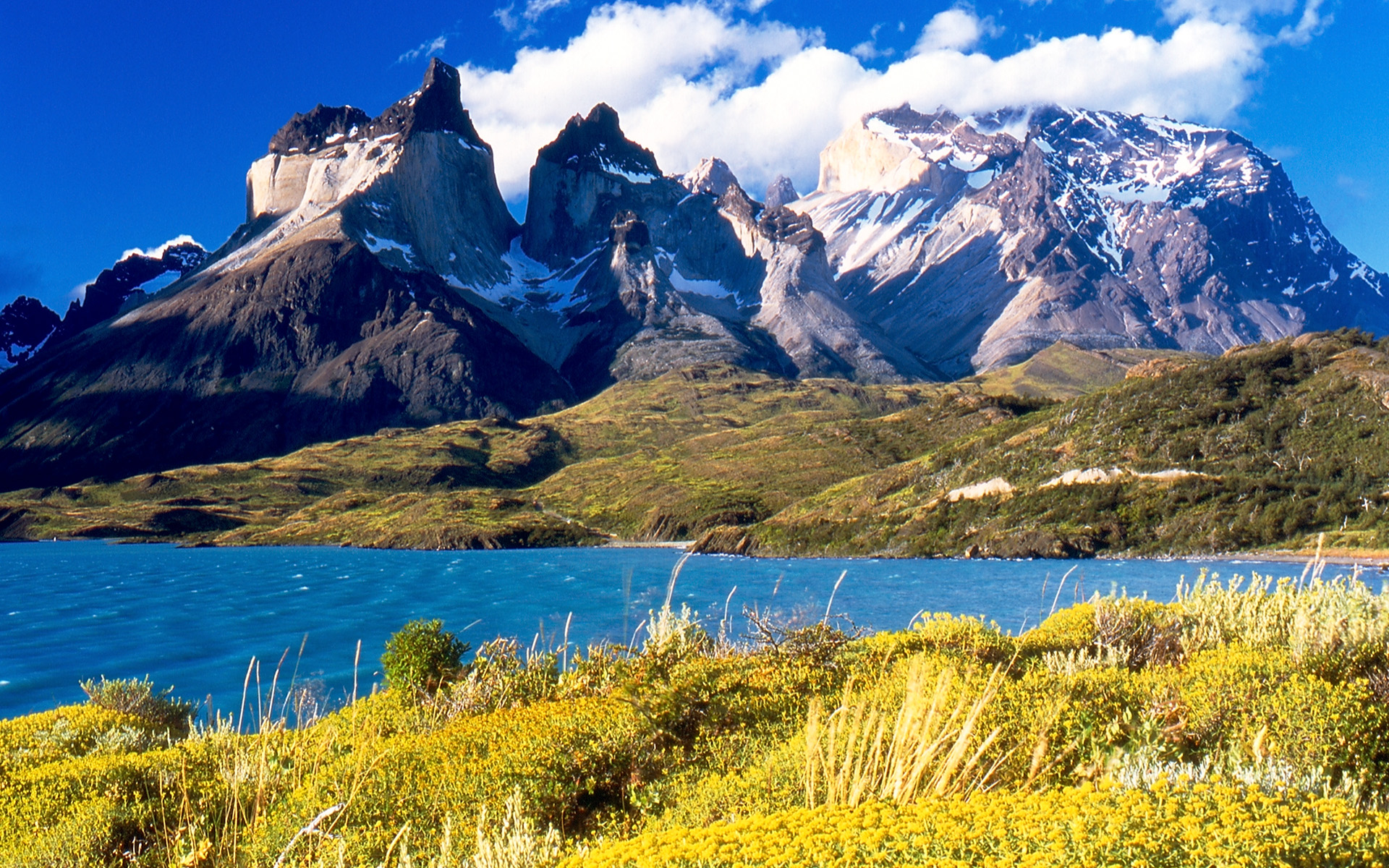 Torres del Paine from Lake Pehoé, Torres del Paine National Park, Chile.